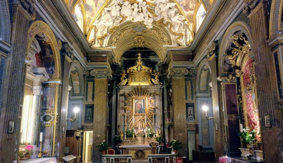 Rom, Kirche Santa Maria in Trivio